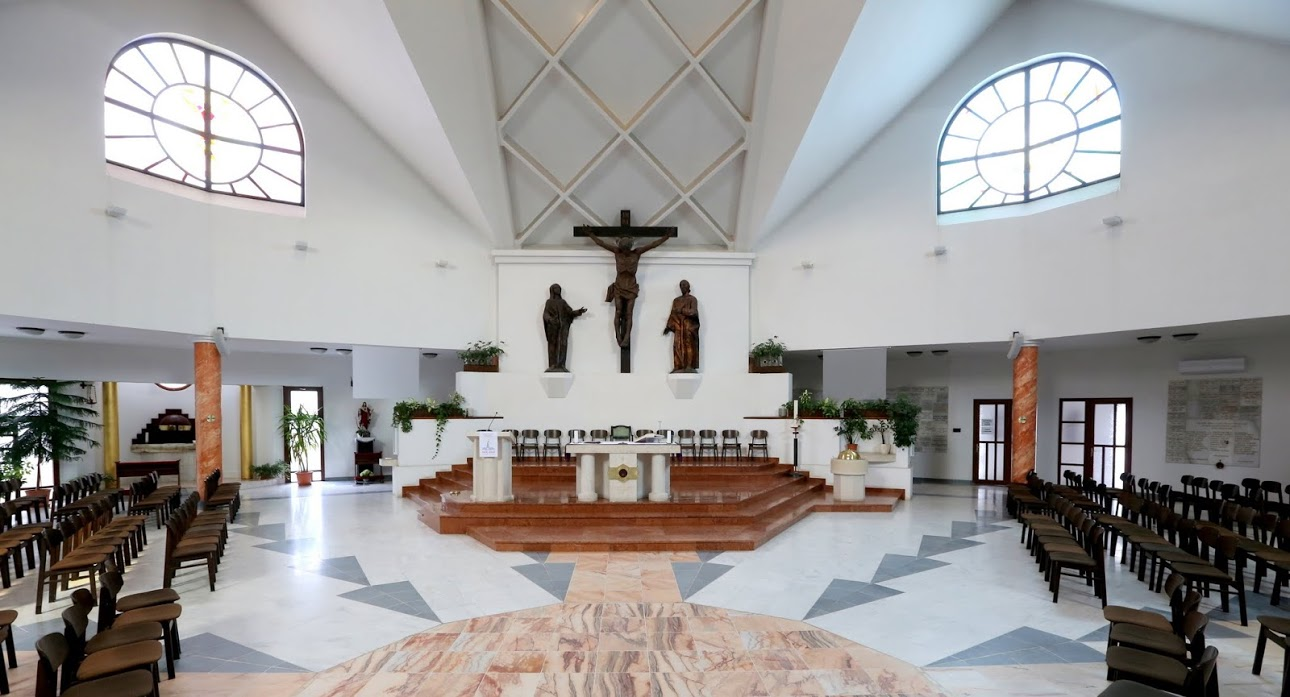 Főoltár